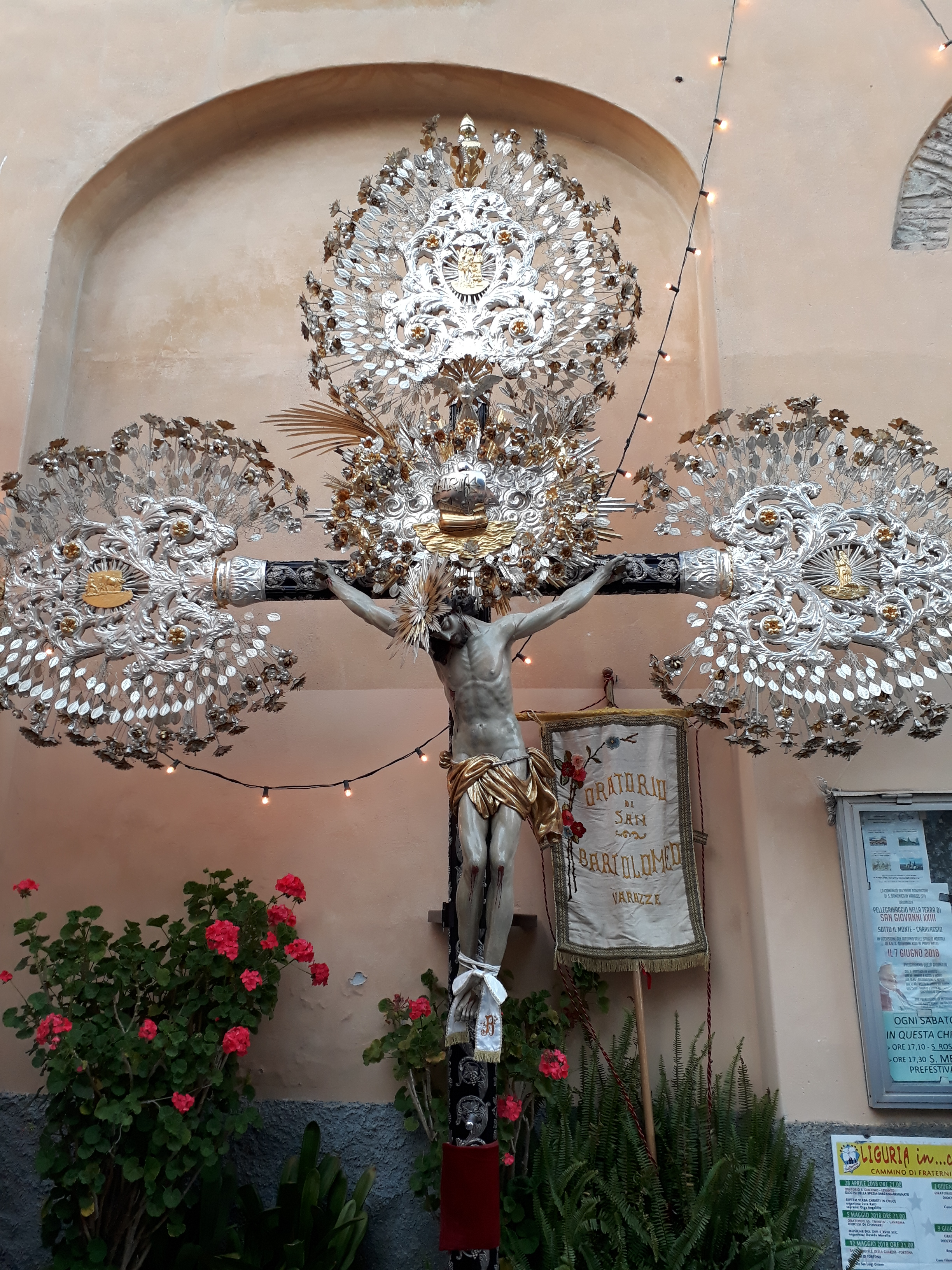 Cristo dell'Oratorio di San Bartolomeo esposto in occasione della processione di Maria Ausilitrice